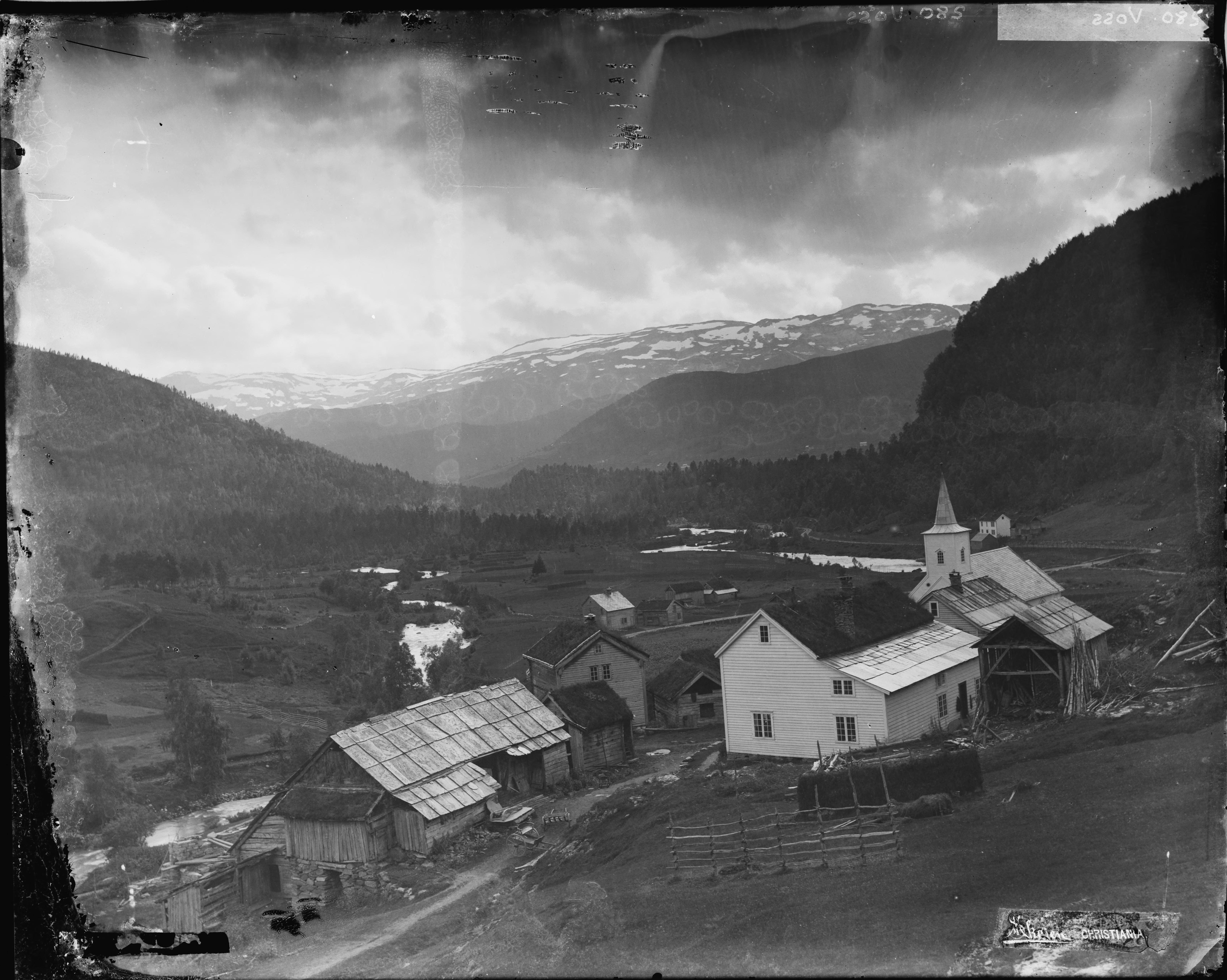 Påskrift negativ: [Uleselig] Skøien Christiania Påskrift negativ: 280 Voss [Riksantikvaren] Påskrift konvolutt: B-281 Vinje, Vossestrand med kirken, oversikt [Riksantikvaren] Sted: Nedre Vinje Kommune: Voss Fylke: Hordaland Tagger: landskap dalføre bebyggelse kirke Vinje kyrkje